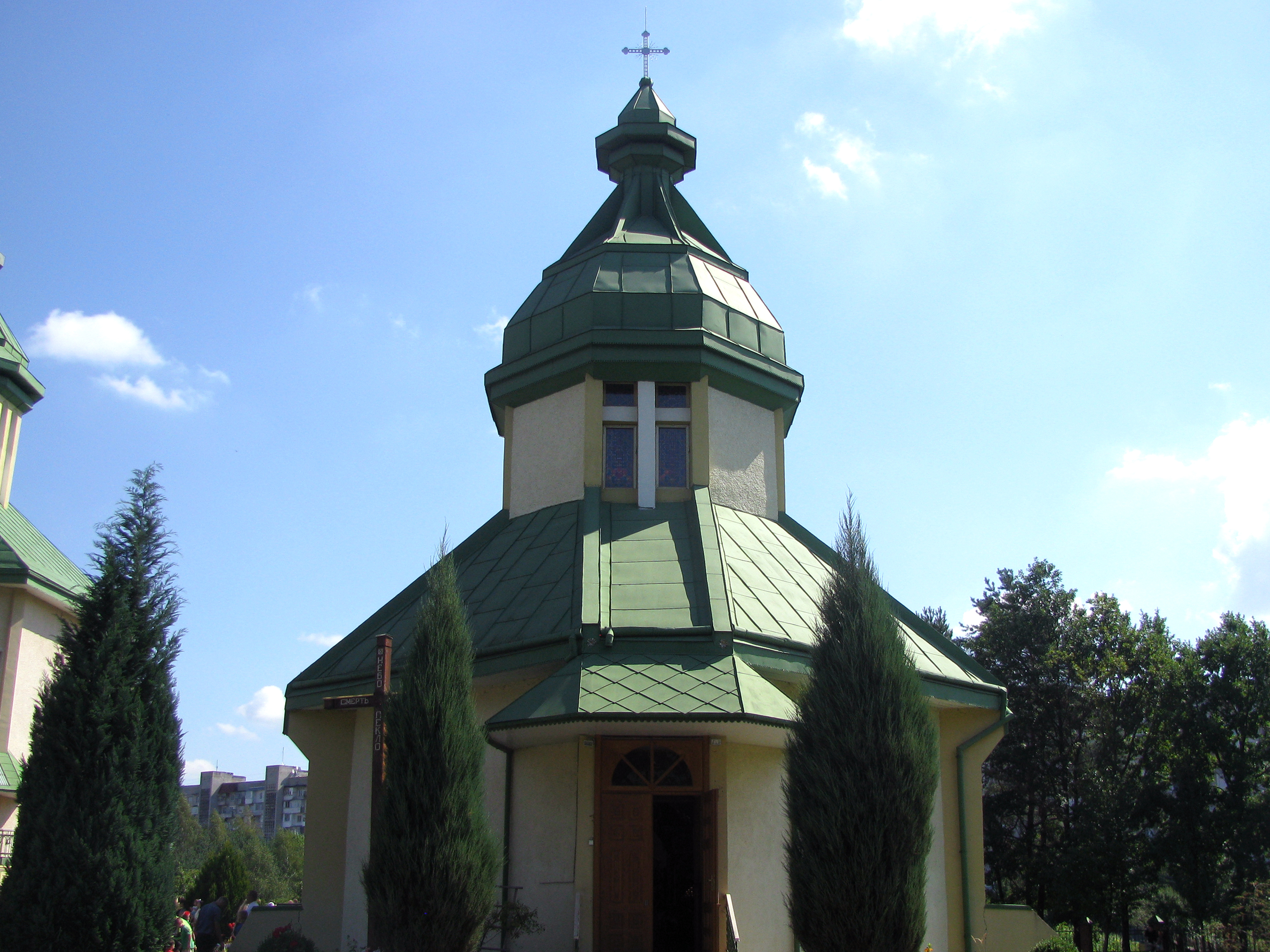 Каплиця Різдва Пресвятої Богородиці.